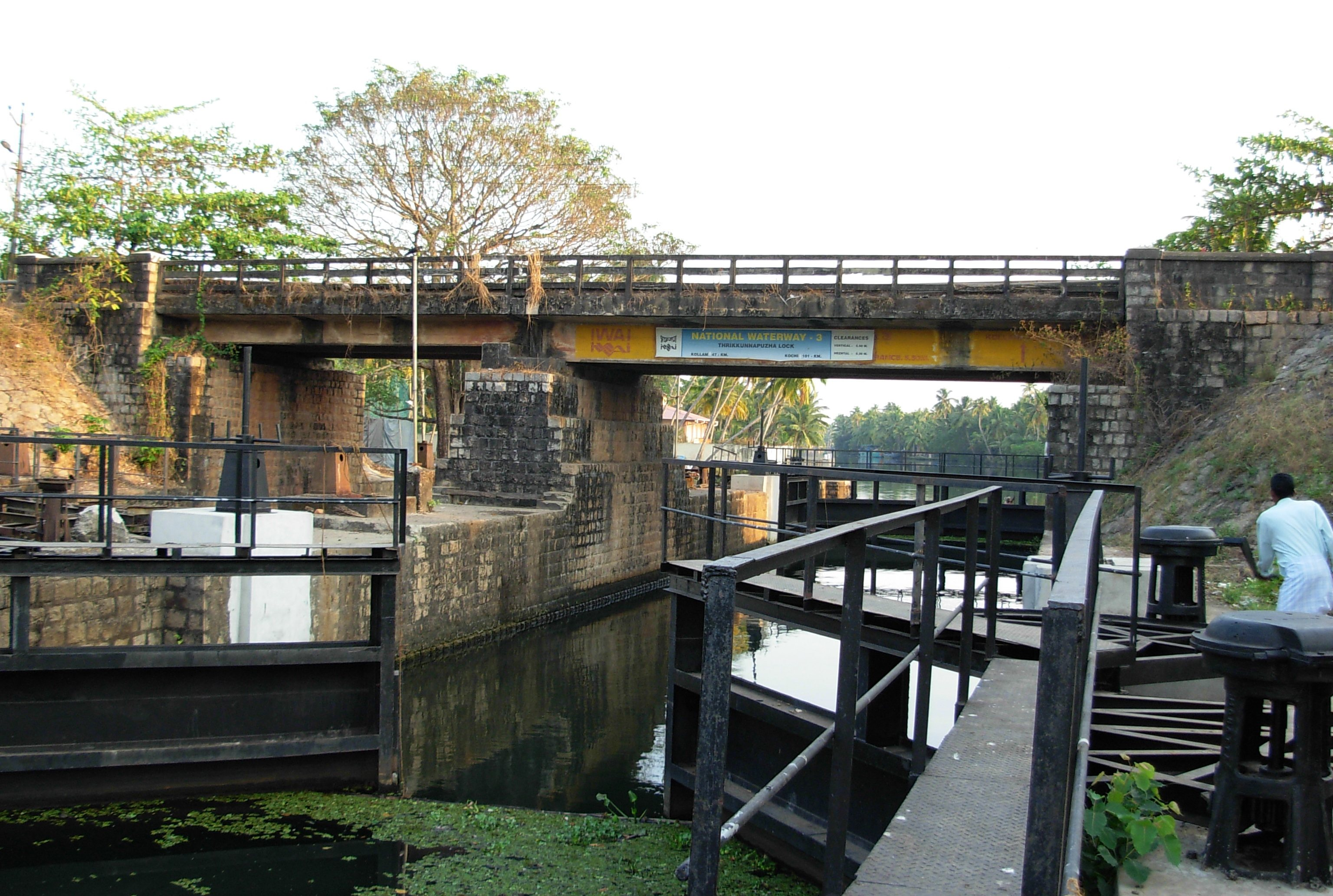 കൊല്ലം - കൊച്ചി ദേശീയജലപാത മൂന്നിന്റെ തൃക്കുന്നപ്പുഴയിലെ ഗേറ്റ്.